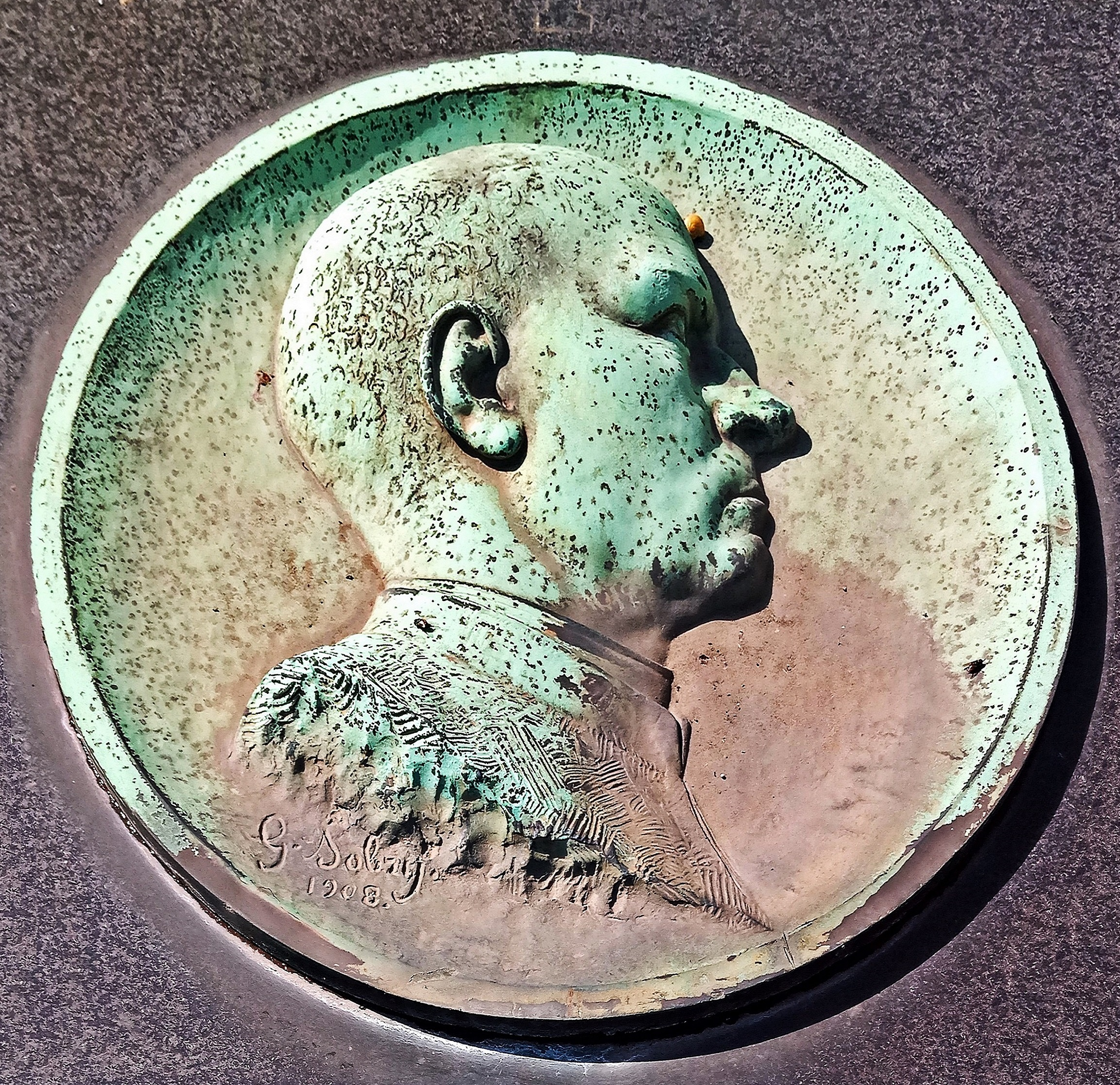 Grabplatte Dompropst Franz Jakob Scheuffgen (1842-1907), Porträtmedaillon mit der Signatur von Gustav Sobry